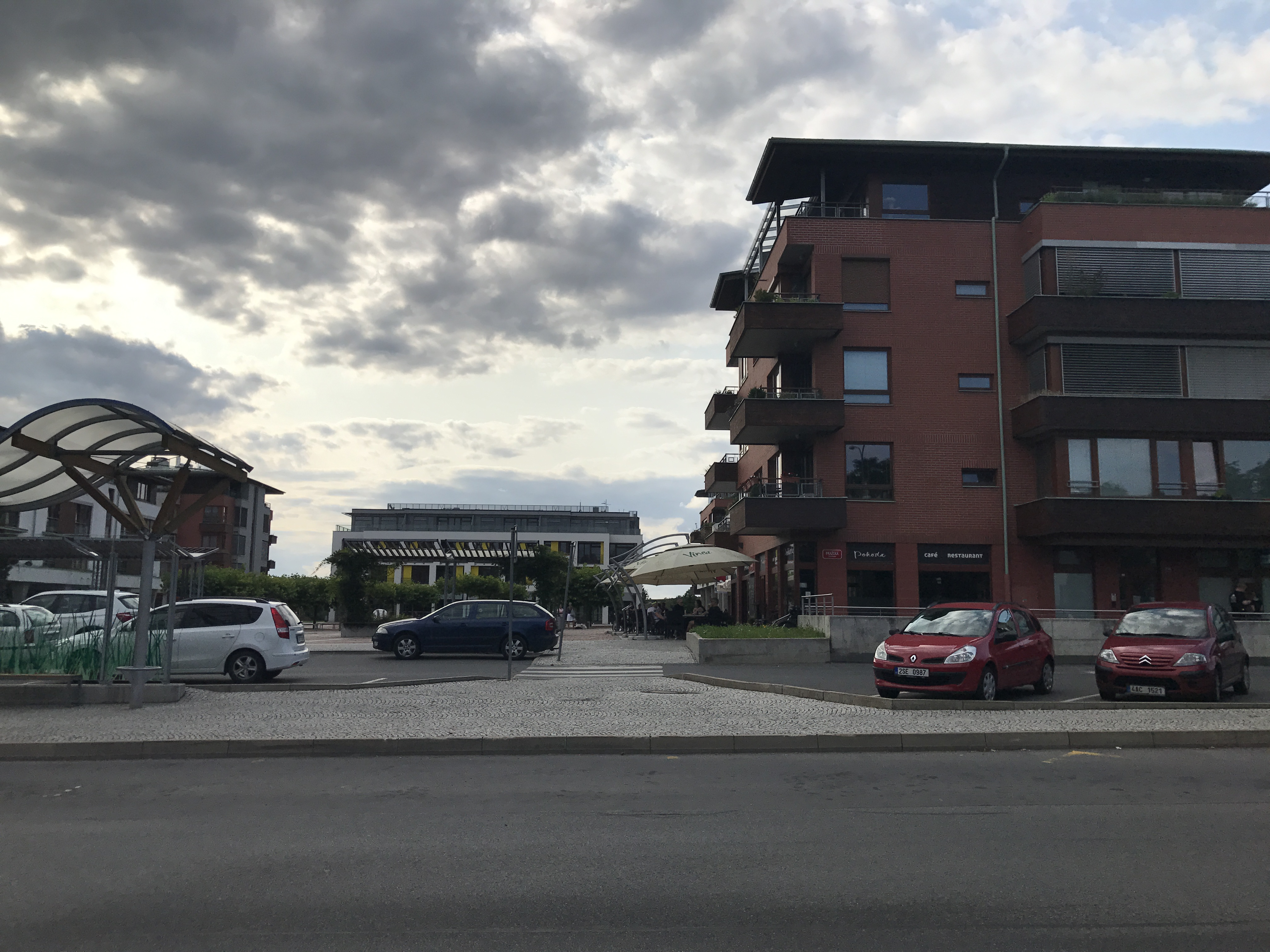 Centrum Dolních Břežan